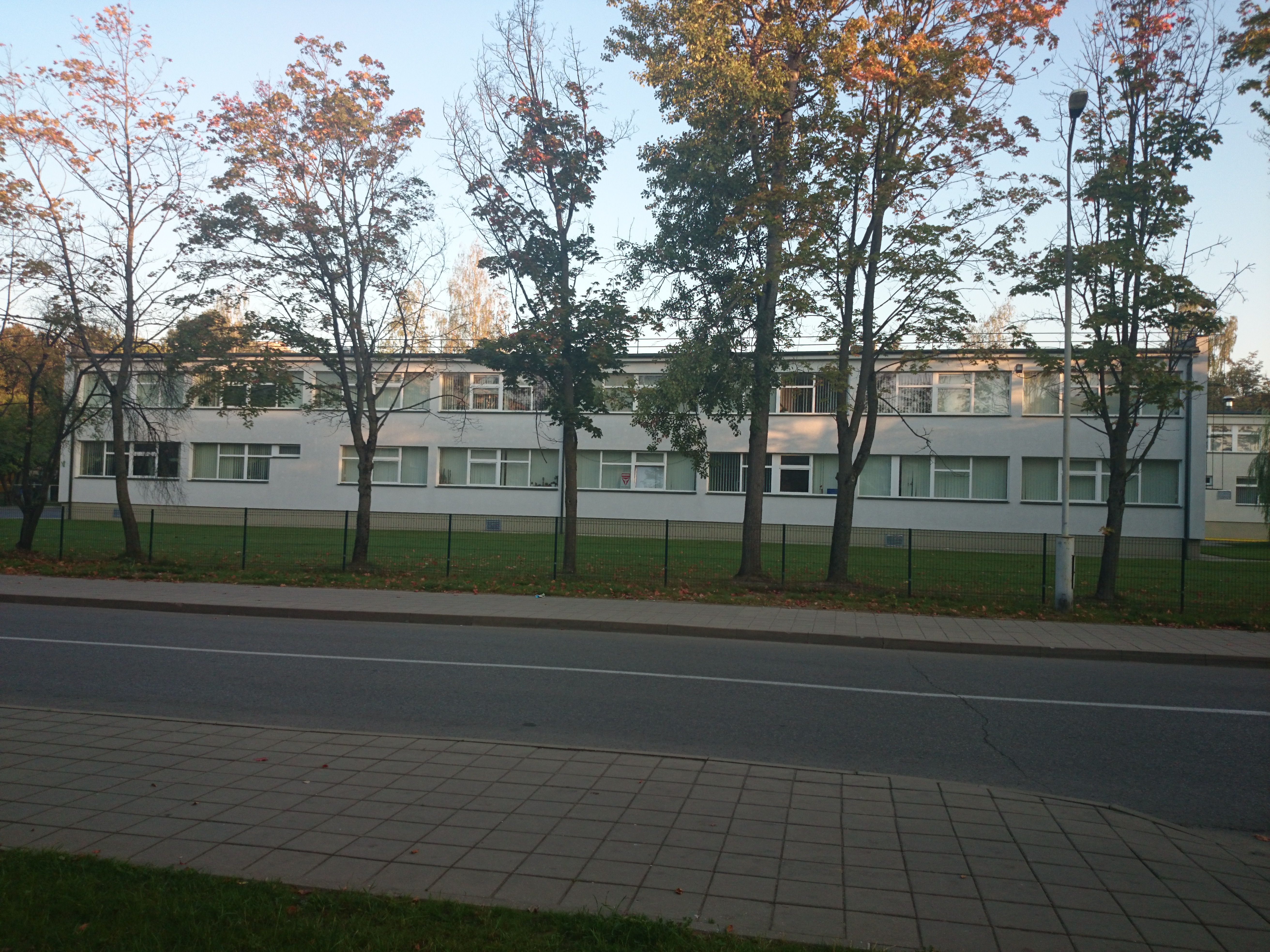 Achemos mokymo centras